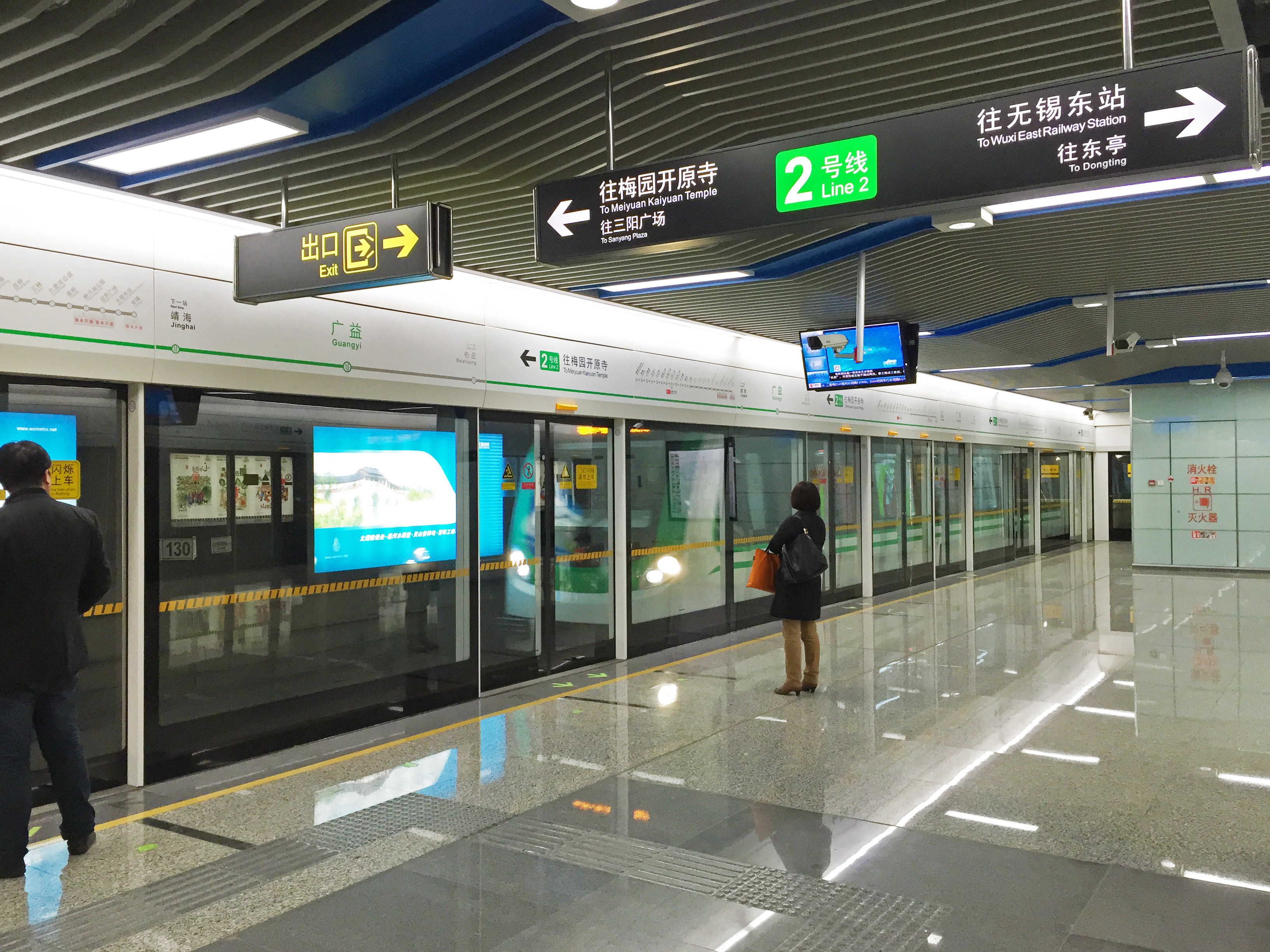 無錫地鐵2號線廣益站站臺